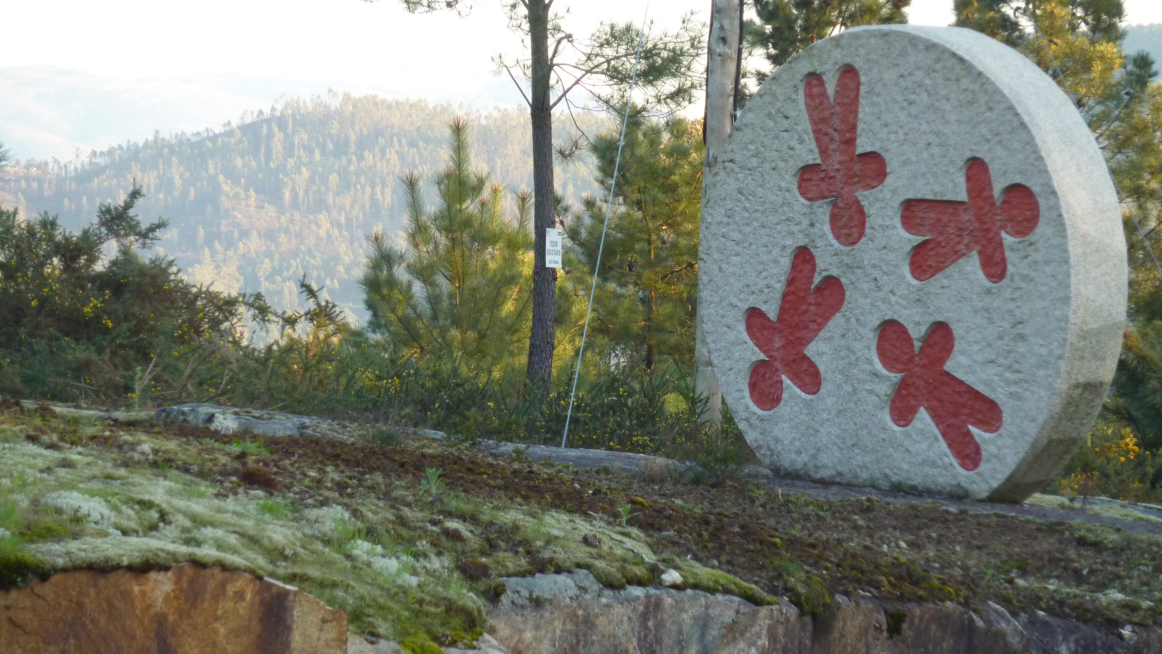 Escultura no concello das Neves (Pontevedra)